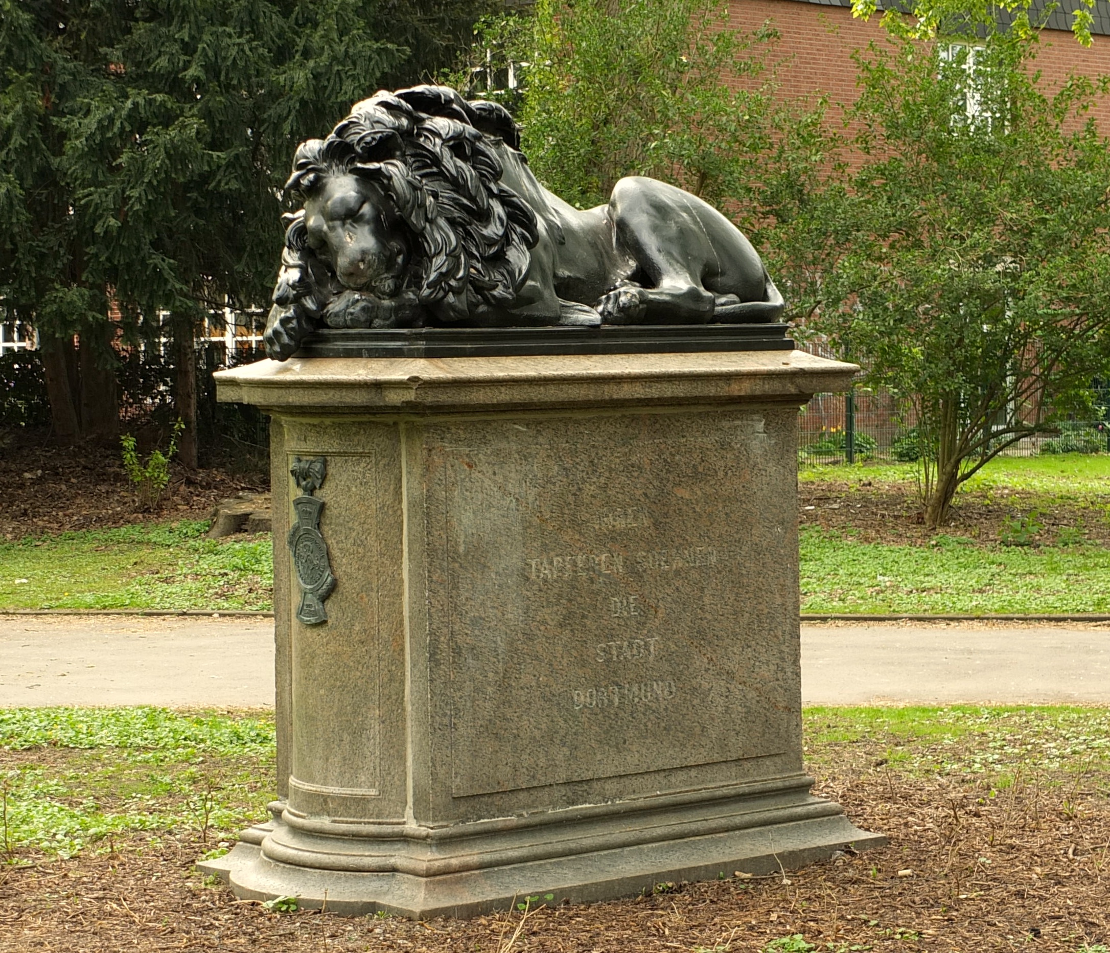 Dortmund, westliche Innenstadt, Westpark, Kriegerdenkmal Löwendenkmal This is a photograph of an architectural monument. 1031